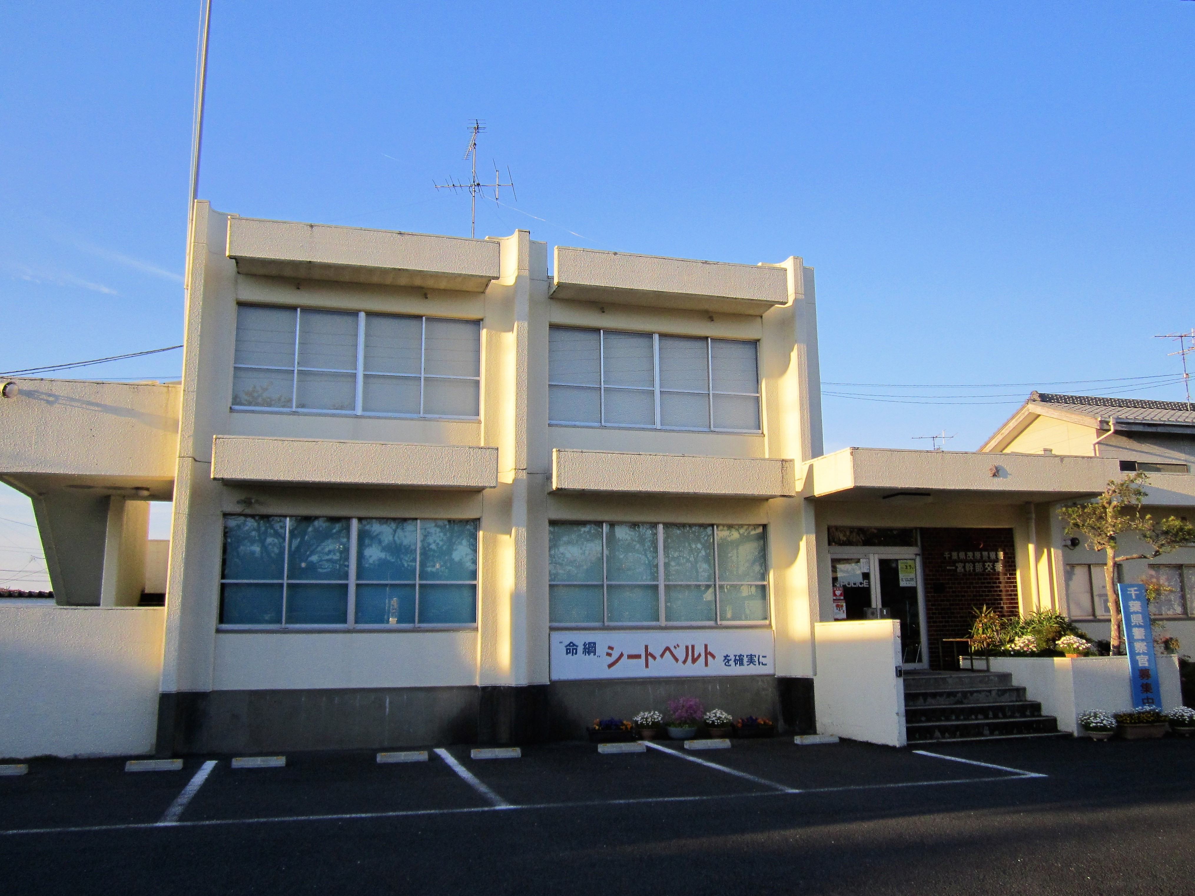 茂原警察署 一宮幹部交番（一宮町田町） Canon PowerShot A2200